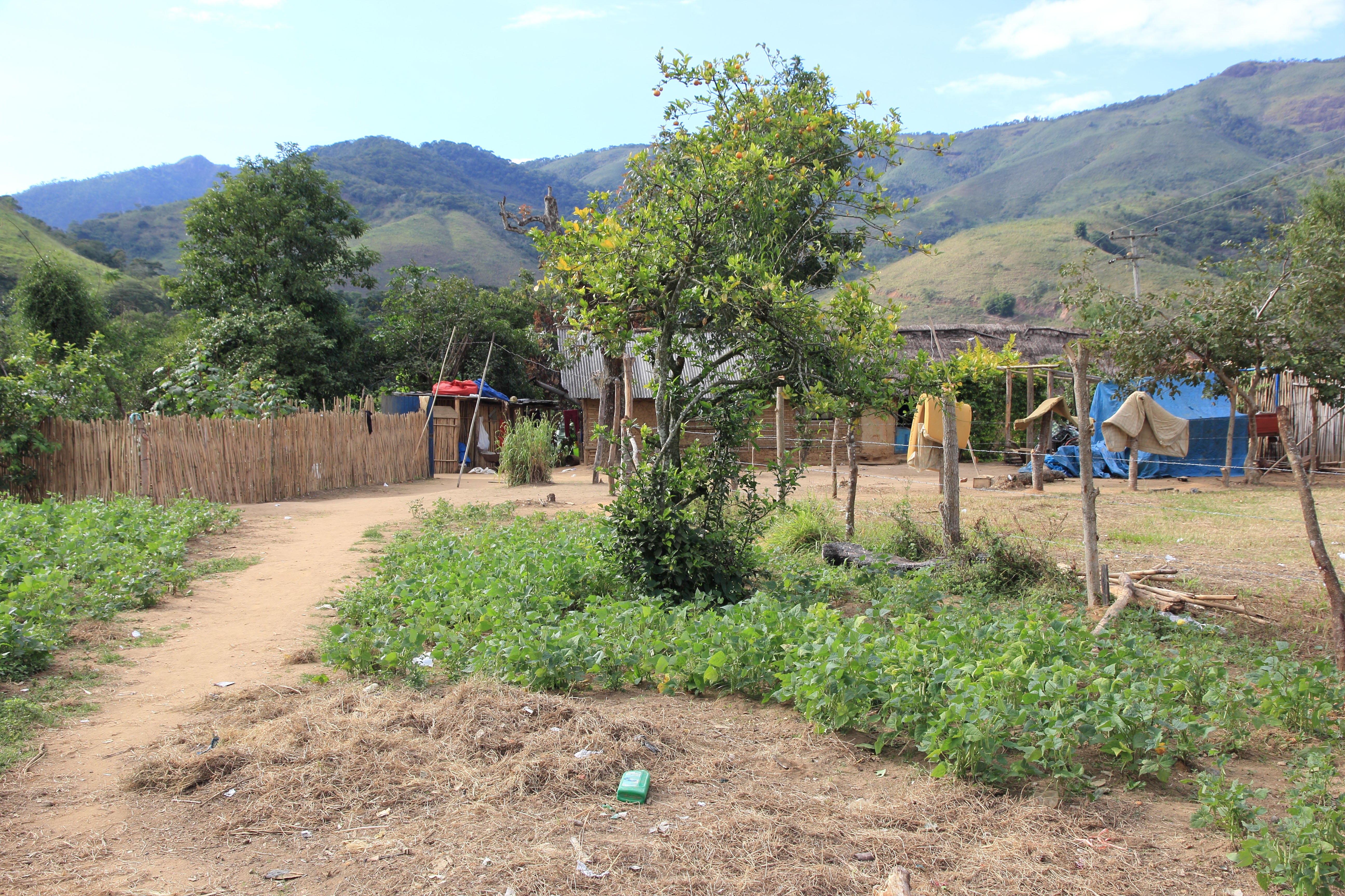 Comunidade descendentes de escravos localizada no Estado do Rio de Janeiro, na cidade de Valença.